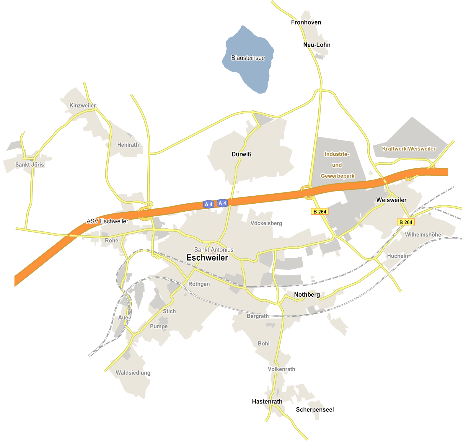 Übersicht über Eschweiler und seine Stadt- und Ortsteile